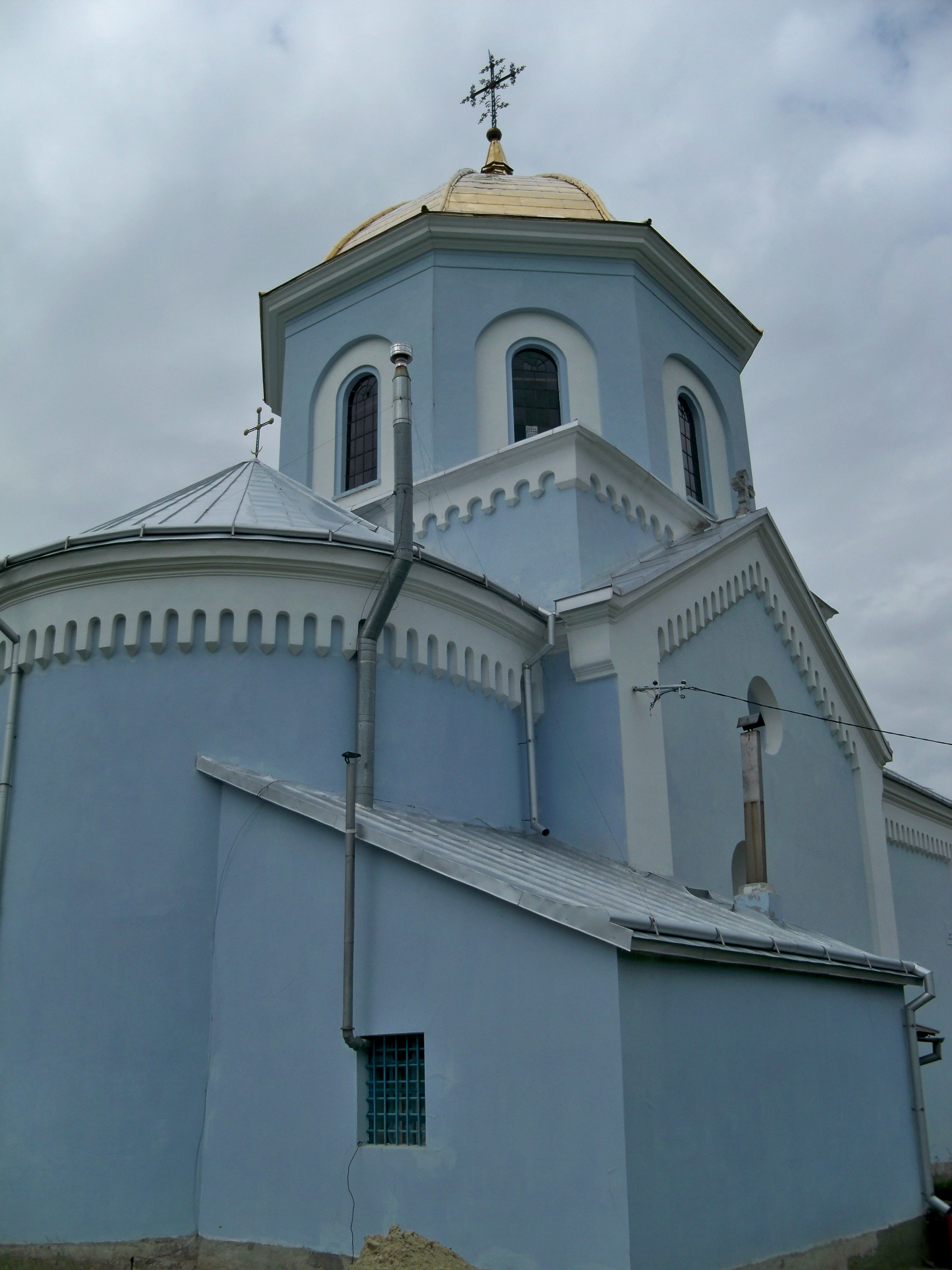 Церква Різдва Богородиці (мур.), с.Піски